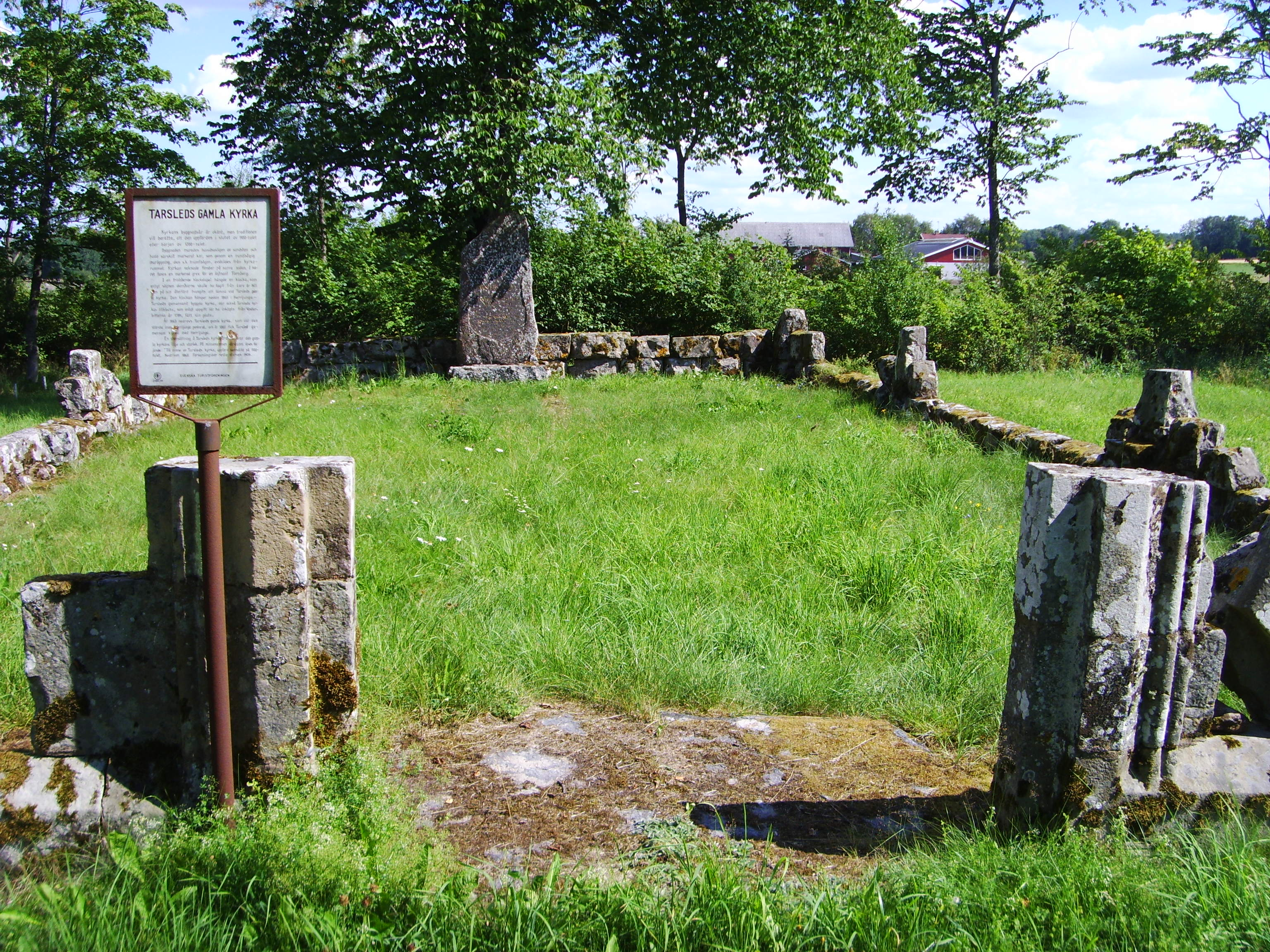 Tarsleds gamla kyrka har ett okänt byggnadsår, men traditionen vill berätta, att den uppfördes i slutet av 1100-talet eller början av 1200-talet. Byggnaden murades huvudsakligen av sandsten och hade särskilt markerat kor, som genom en rundbågig muröppning, den s k triumfbågen, avskiljdes från kyrkorummet. Kyrkan saknade fönster på norra sidan. I koret fanns en markerad grav för löjtnant Tornberg. I en fristående klockstapel hängde en klocka, som enligt sägnen danskarna skulle ha tagit från Larv år 1611, men på sin återfärd tvungits lämna vid Tarsleds gamla kyrka. Den klockan hänger sedan 1865 i Herrljunga – Tarsleds gemensamt byggda kyrka, där också Tarsleds kyrkas lillklocka, som enligt uppgift lär ha inköpts från Västerbitterna år 1789, fått sin plats. År 1863 nedrevs Tarsleds gamla kyrka, som var den största inom Herrljunga pastorat, och år 1865 fick Tarsled gemensam kyrka med Herrljunga. En stensättning å Tarsleds kyrkogård markerar den gamla kyrkans läge och storlek. På minnesstenen därstädes läses följande: ”Till minne av Tarsleds kyrka, uppförd sannolikt på 1100-talet. Nedriven 1863. Församlingsbor reste stenen 1909.” Tarsleds nuvarande klockstapel och kyrkklocka invigdes 1956 av biskop Sven Danell.